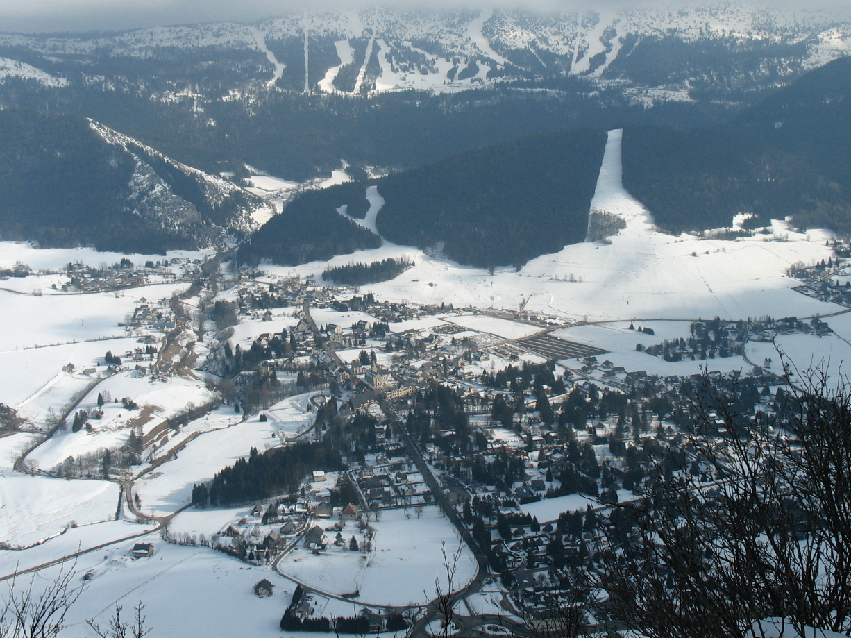 Vue générale de Lans-en-vercors depuis Jaume